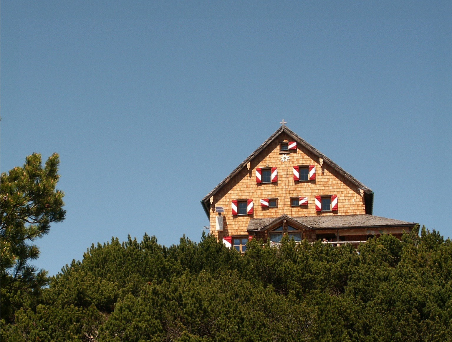 Peter Wiechenthaler Hütte